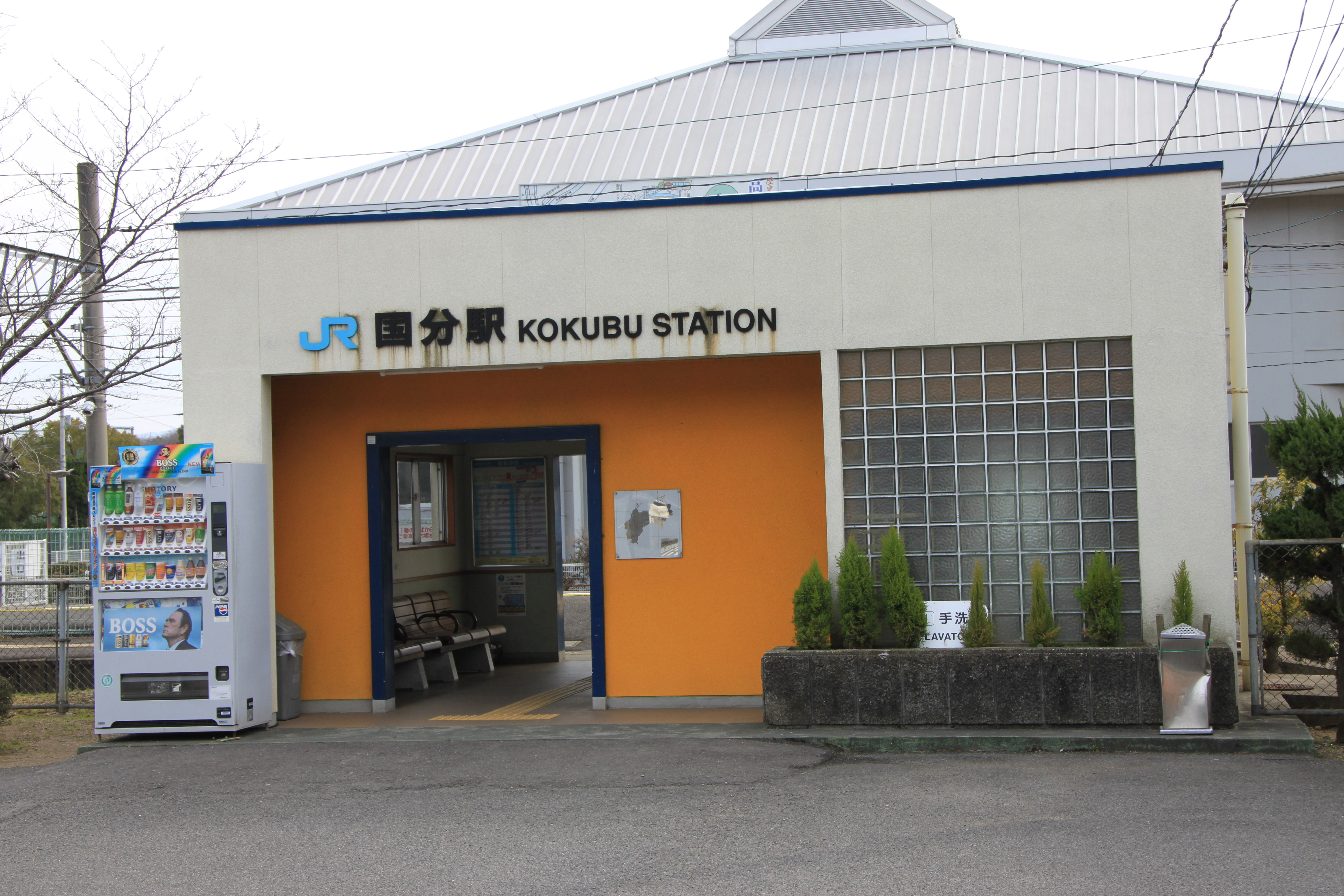 国分駅 駅舎